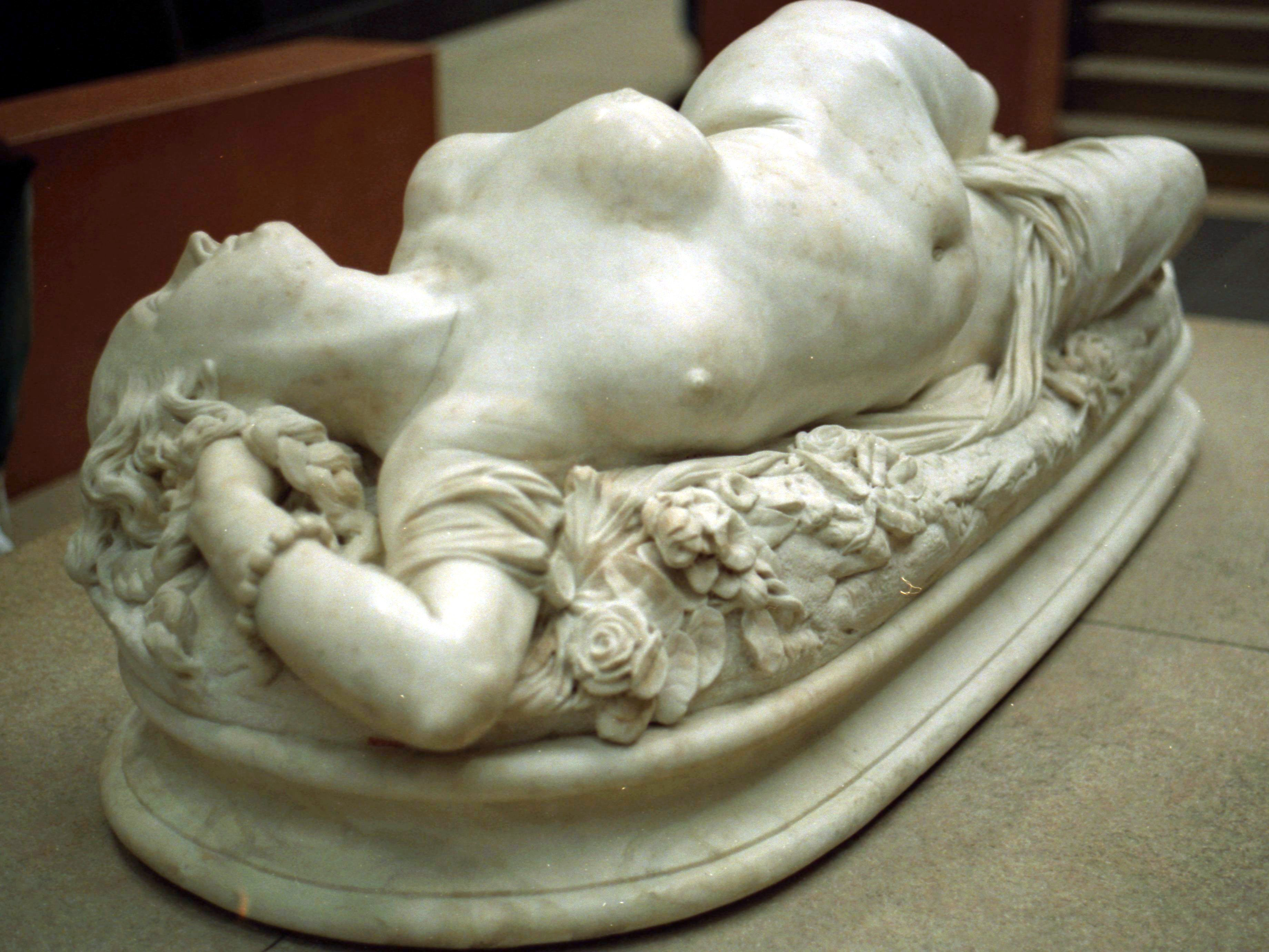 Auguste Clésinger: Femme piquée par un serpent, 1847, marbre, Paris, Musée d'Orsay. (This is Apollonie Sabatier)